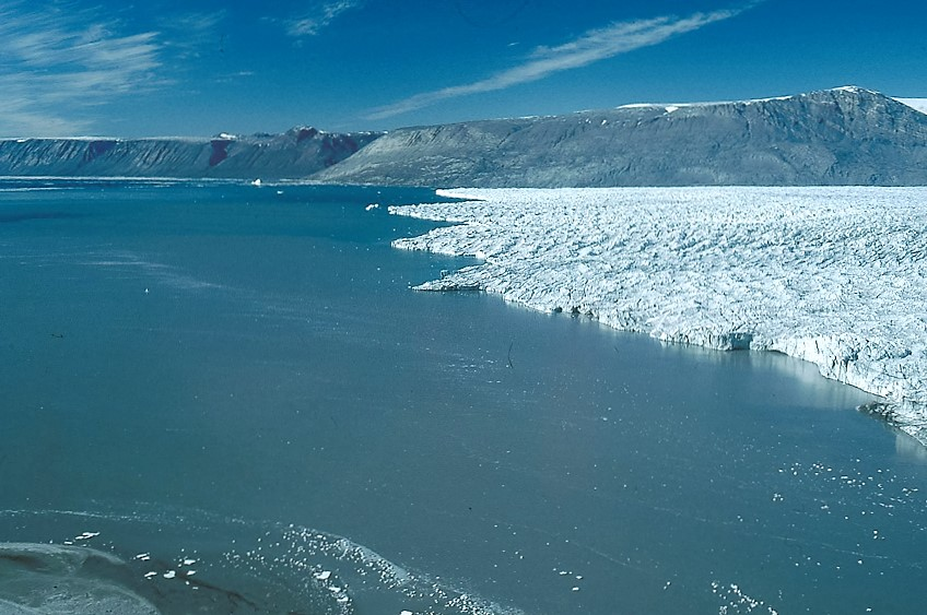 View near Kap Kolthoff Kejser Franz Josef Fjord, mod Waltershausen Gletscher